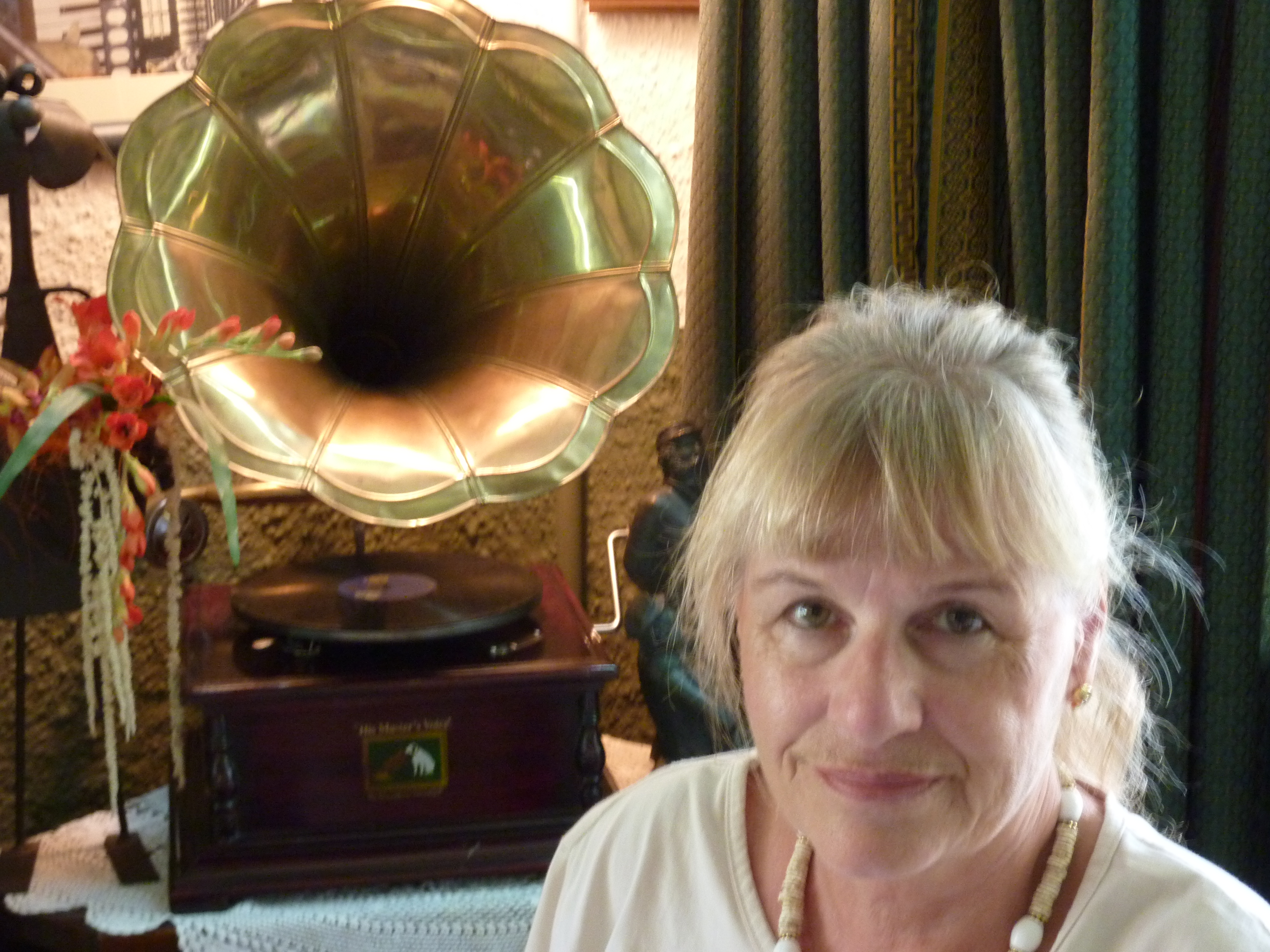 Bild der Autorin von Musikbüchern